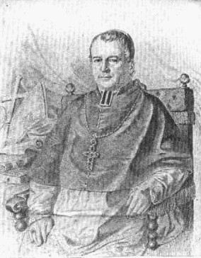 František Vilém Tippmann